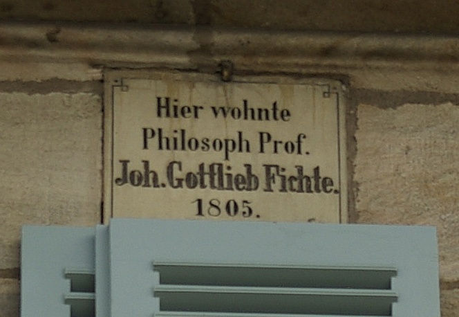 Gedenktafel für Johann Gottlieb Fichte am Loewenichschen Palais in der Nürnberger Straße 9 in Erlangen.